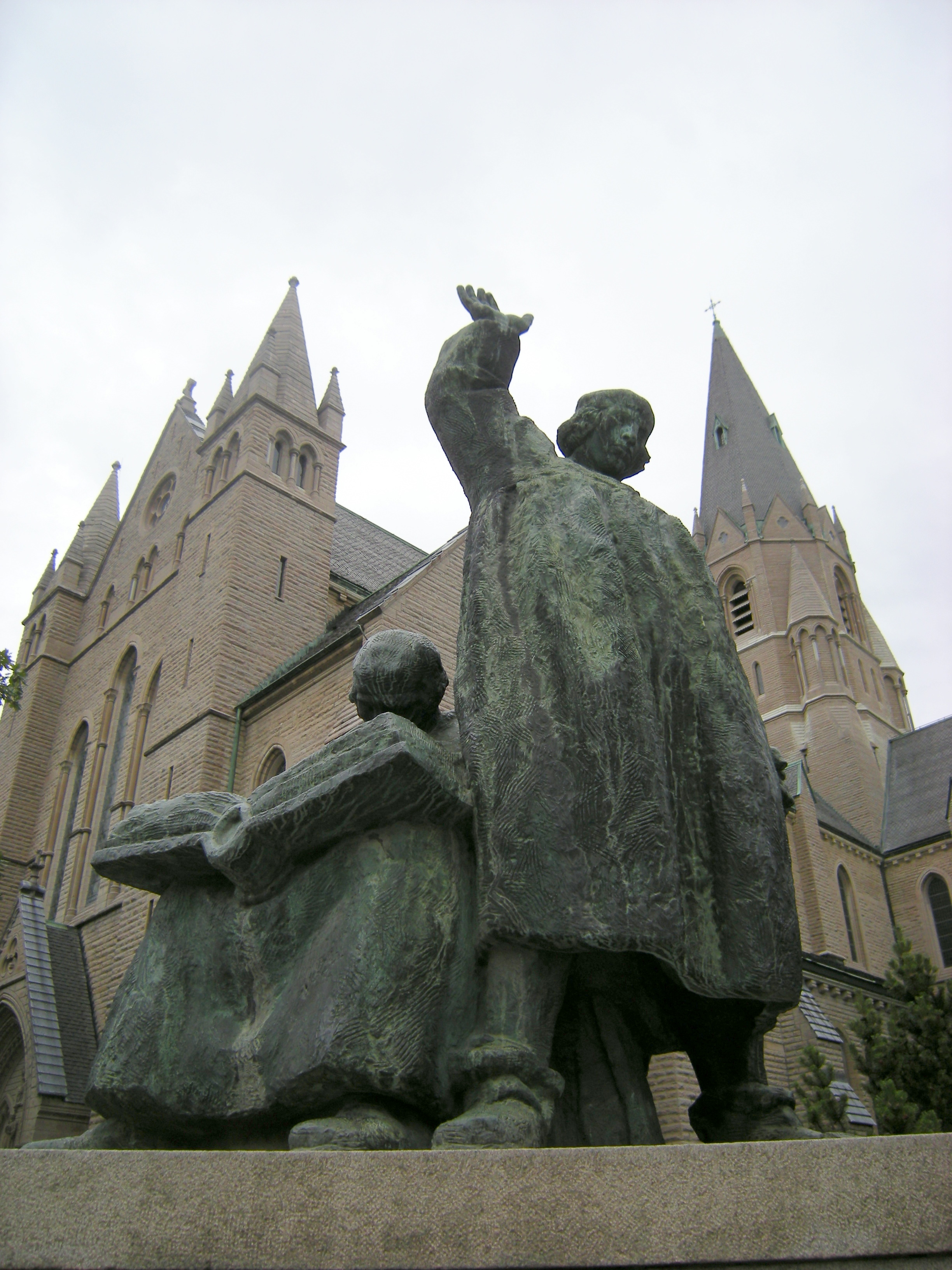 Olaus Petri kyrka i Örebro, staty av bröderna Olaus och Laurentius Petri av Nils Sjögren